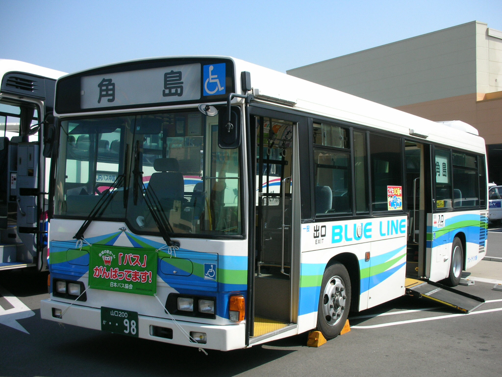 バスまつり会場にて撮影